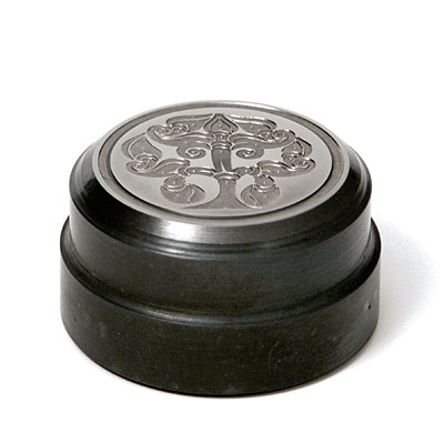 Pantográf maróval készült sajtolószerszám érem veréséhez